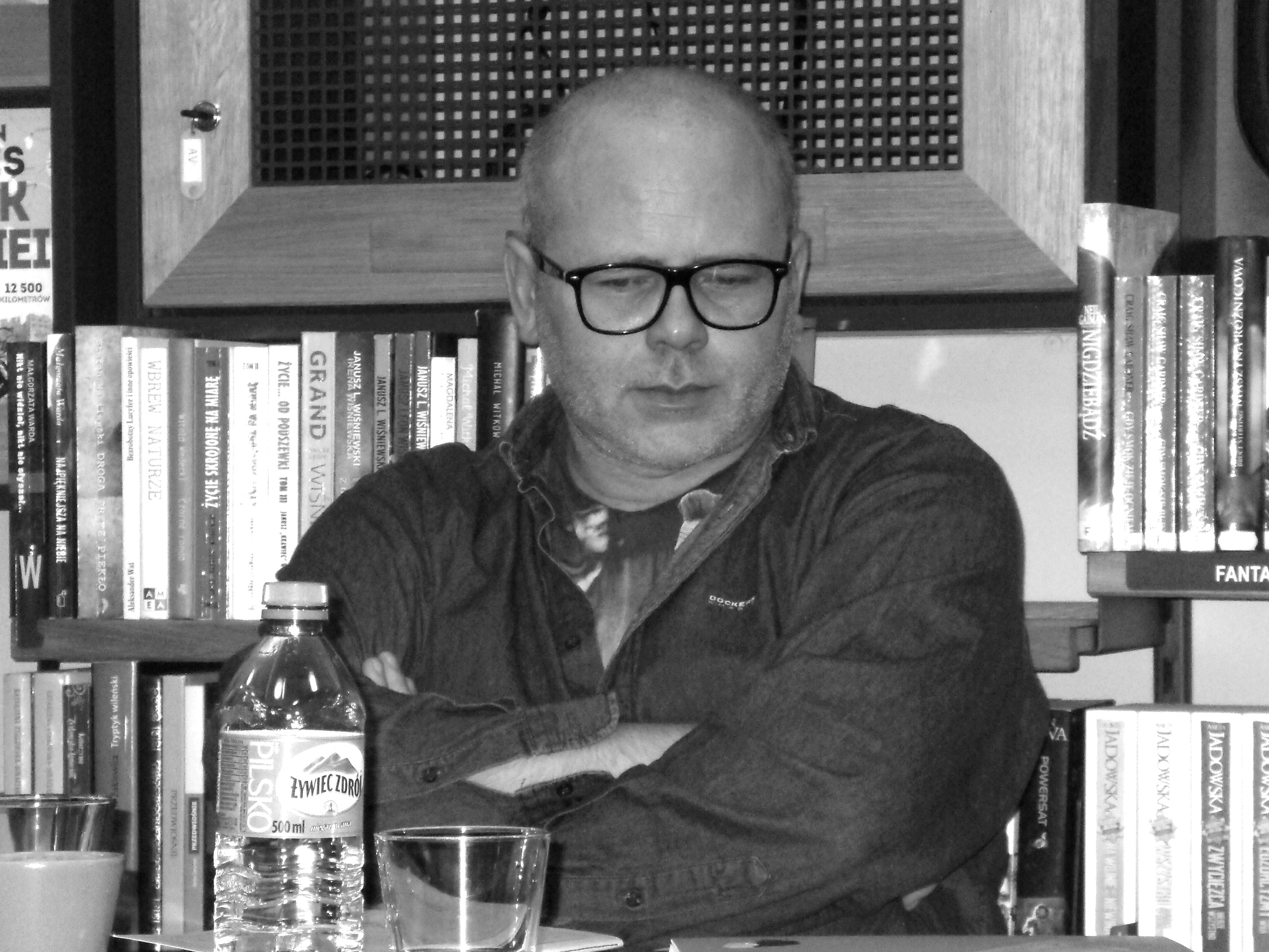 Marcin Sendecki, poeta i dziennikarz.